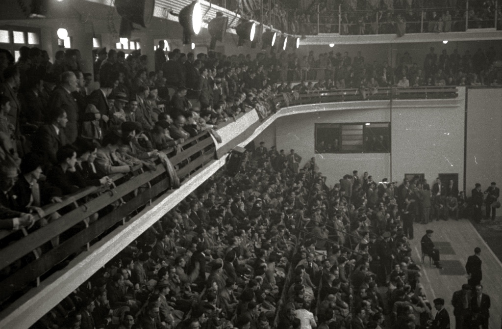 Título original: Partido de pelota en el frontón de Gros (22/22) Localización: San Sebastián (Guipúzcoa)